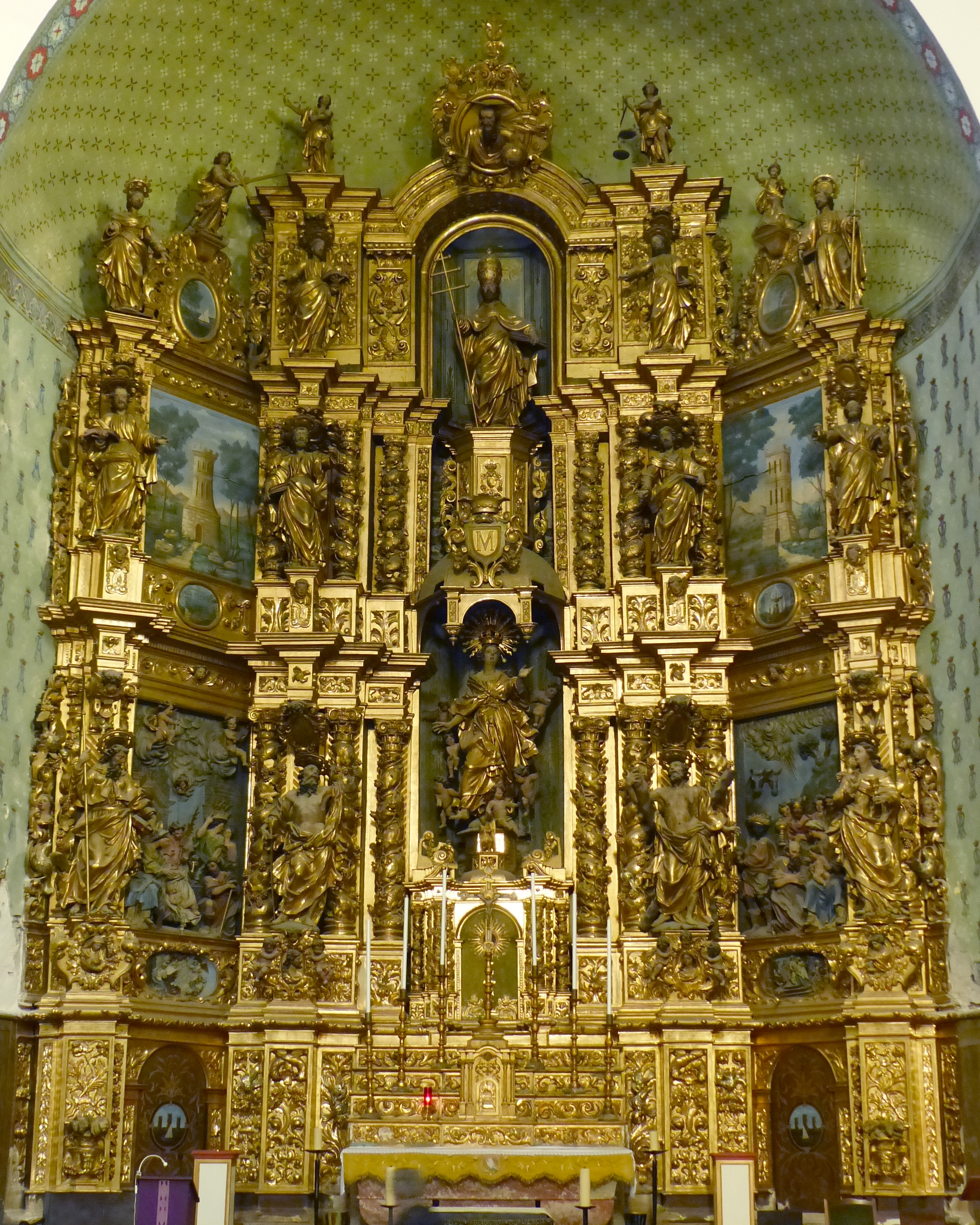 Collioure (Pyrénées-Orientales, France), intérieur de l'église Notre-Dame-des-Anges; retable du maître-autel réalisé de 1698 à 1705 par le célèbre sculpteur catalan Josep Sunyer.